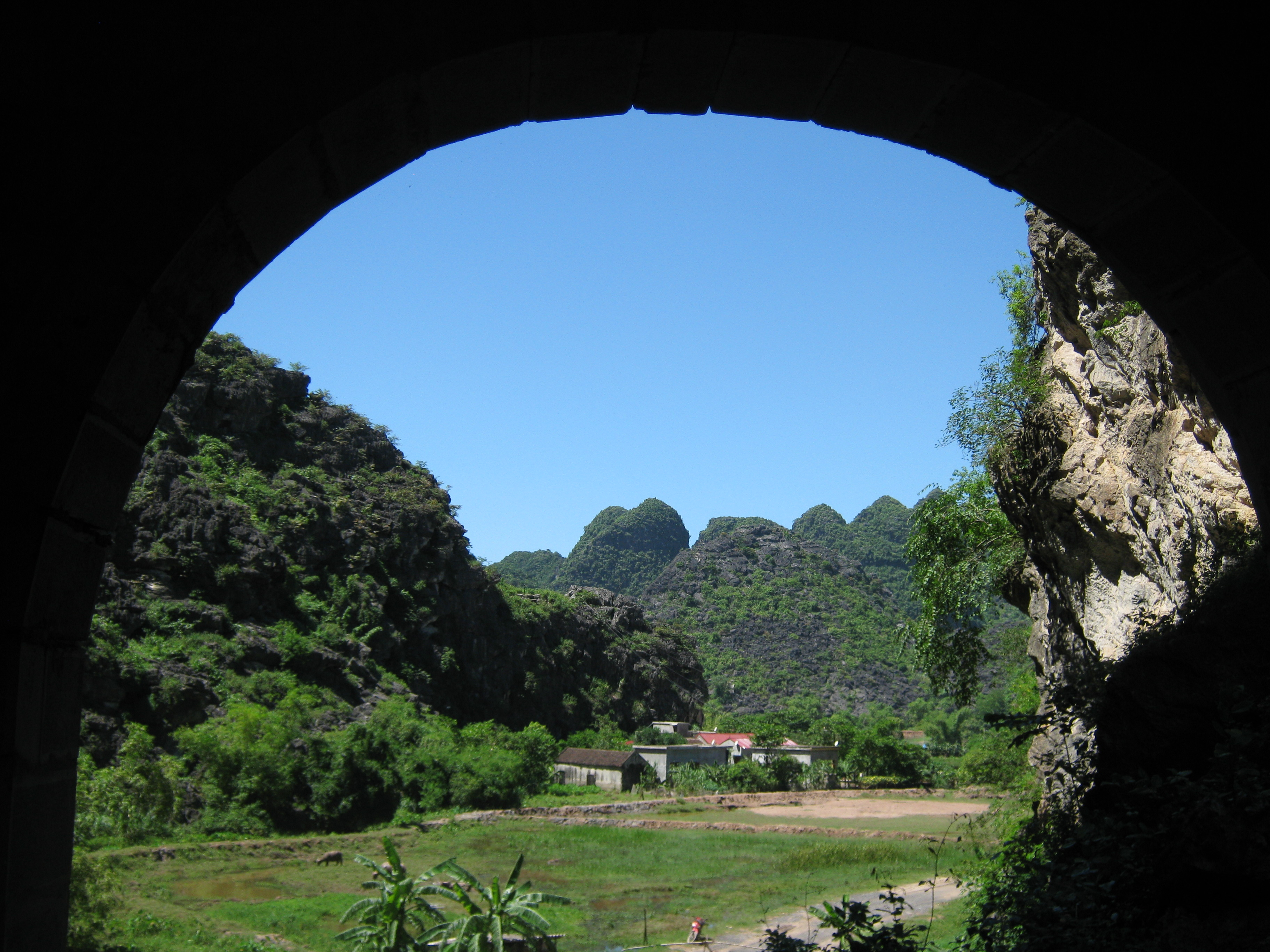 Phong cảnh chùa động Am Tiên ở cố đô Hoa Lư, Ninh Bình.